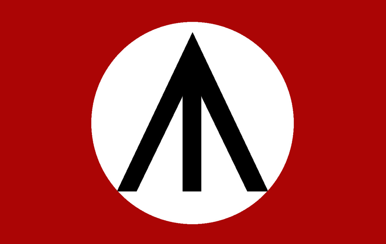 Родовая тамга рода Адай на значке